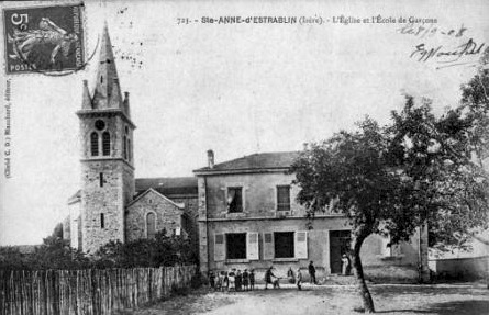 Sainte-Anne-sur-Gervonde, Isère, France. L'église et l'école des garçons. Carte postale ancienne.